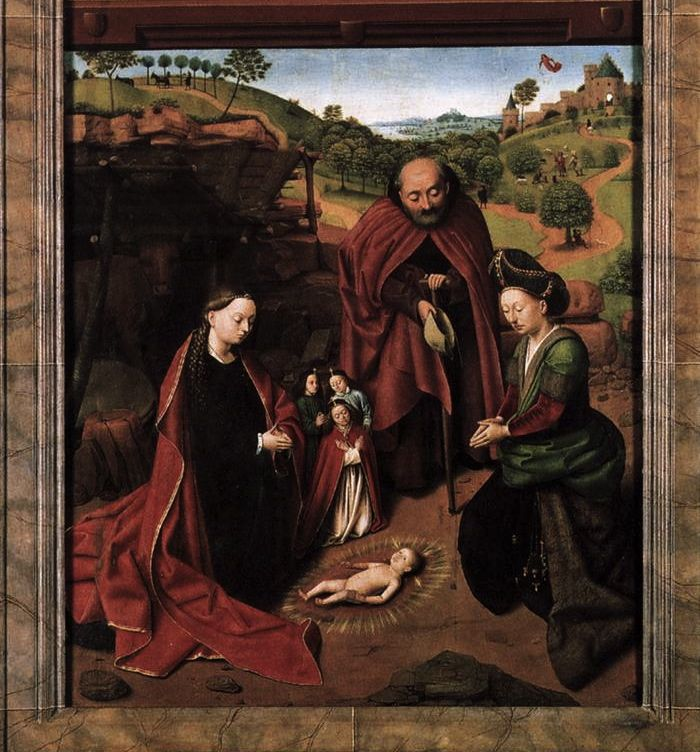 Annonciation de Petrus Christus, partie inférieure d'un panneau double